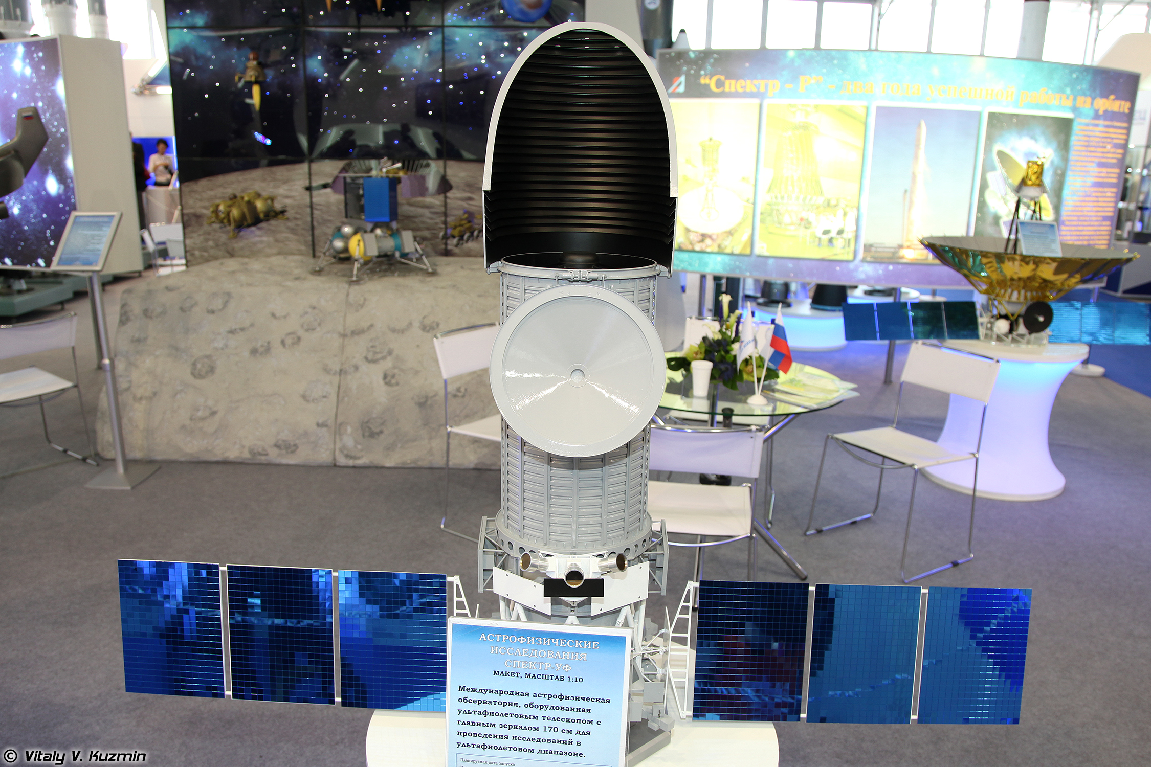 Космический аппарат Спектр-УФ (Spektr-UF spacecraft)